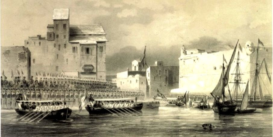 Arrivée du duc Antoine de Montpensier, fils du roi Louis-Phillipe de France, au port de La Goulette (Tunisie) en juin 1845